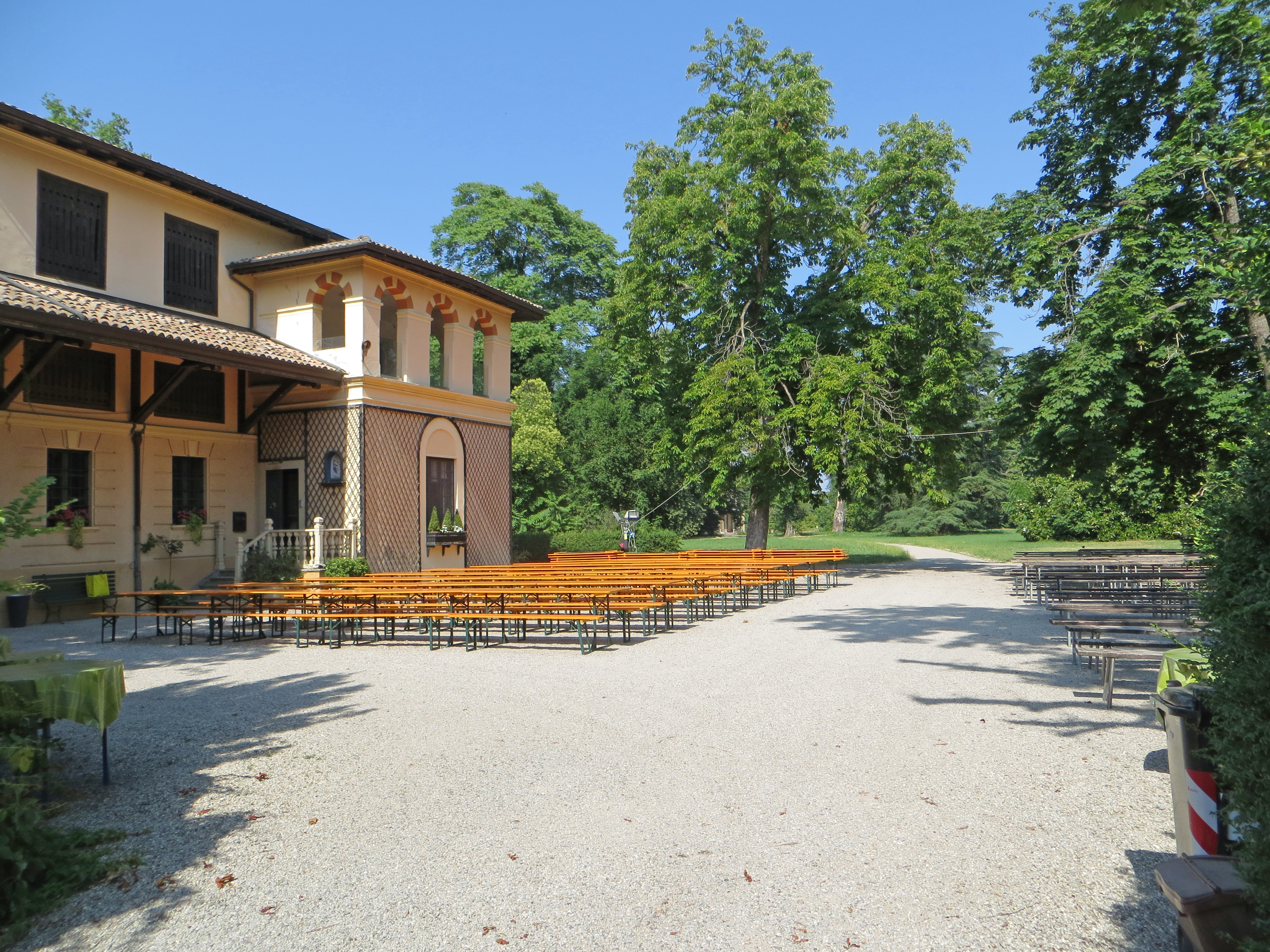 Villa Meli Lupi (Vigatto, Parma) - lato sud del Palazzo e viale d'ingresso alla villa